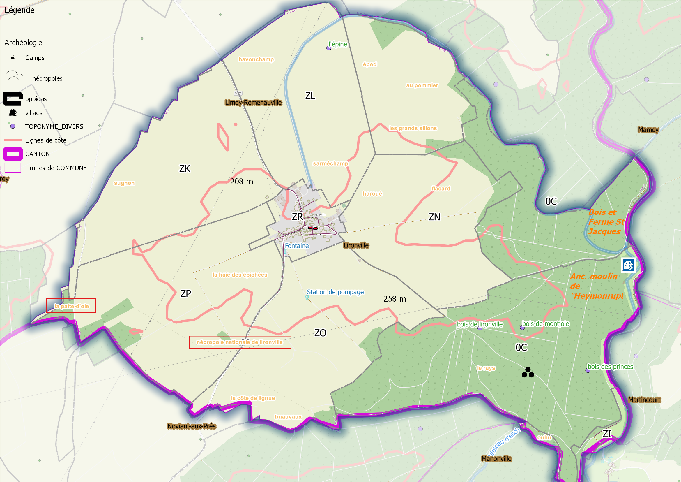 Lironville (ban communal), OSM et Qgis, mentions additionnelles